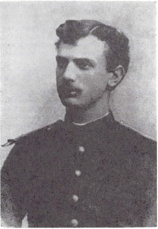 Generalul român Teodor Tăutu ca sublocotenent